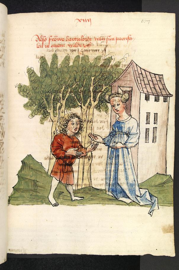 Herzeloyde und Parzival im Wald von Soltane. Aus: Wolfram von Eschenbach, Parzival (Handschrift), Hagenau, Werkstatt Diebold Lauber, um 1443-1446, Cod. Pal. germ. 339, I. Buch, Blatt 87r. Bildtitel: Herzeloyde und Parzival im Wald von Soltane Transkription Bildüberschrift: Also fröwe hertzeloide iren suon parcifalen in einem walde zoch